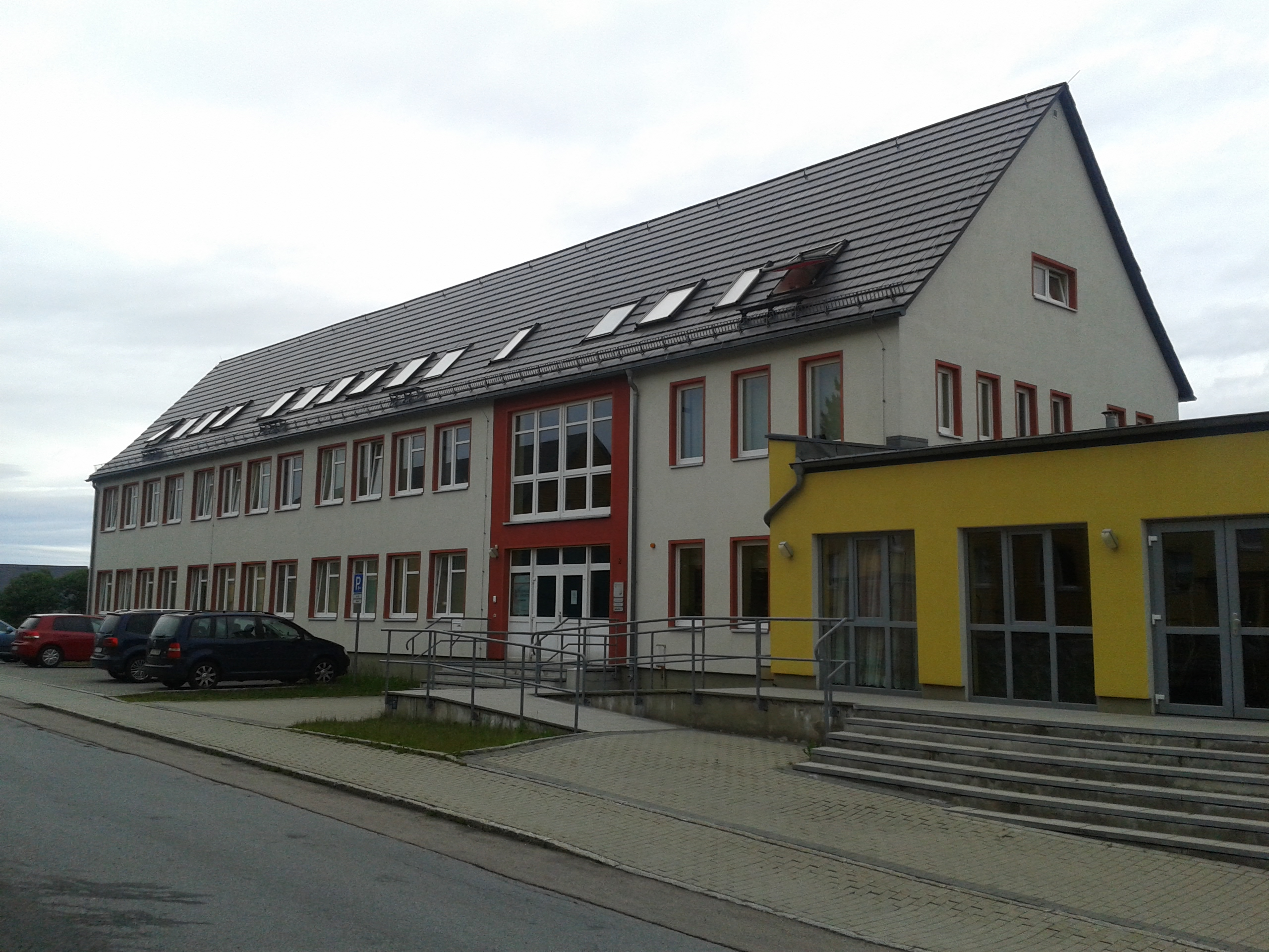 Außenansicht des Internatgebäudes für Leistungssportler am „Glückauf“-Gymnasium Dippoldiswalde/Altenberg